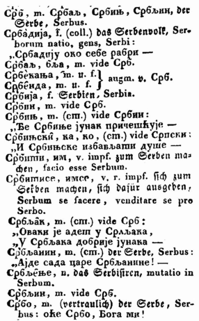 Soomaaliga: Srpski rječnik Vuka Karadžića iz 1818. godine na slovo s.